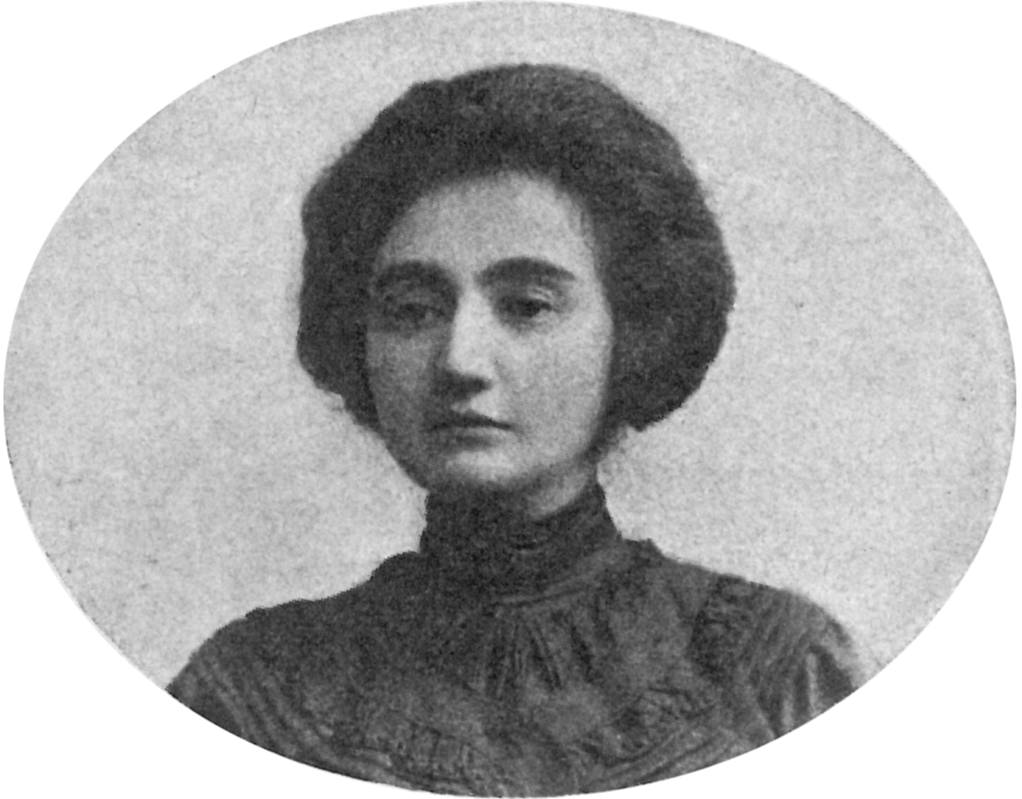 Fotografia pisarki i poetki Jadwigi Marcinowskiej opublikowana w Tygodniku Illustrowanym w 1914 r.